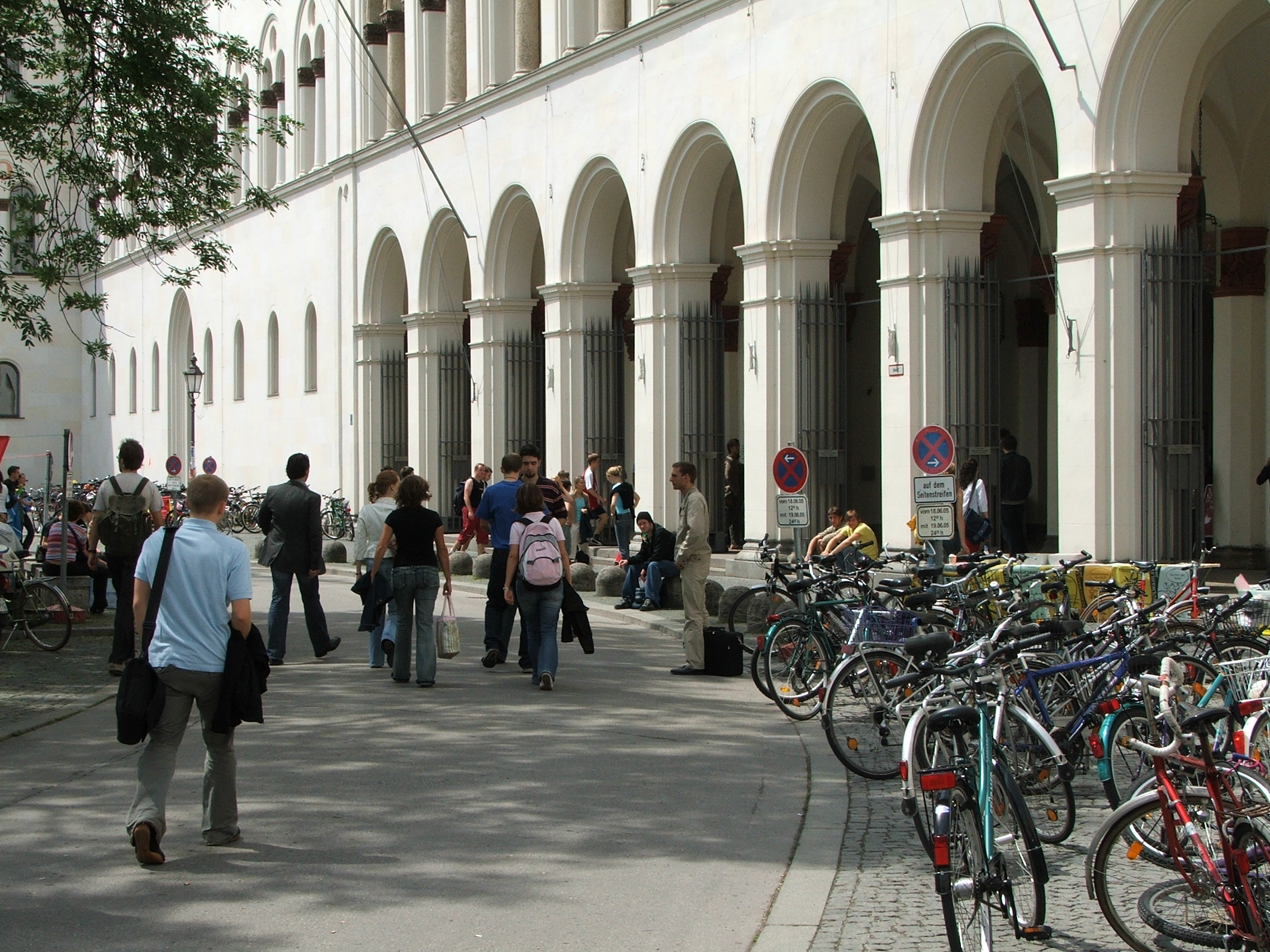 Vor der Uni, Geschwister-Scholl-Platz (Ludwig-Maximilians-Universität München)